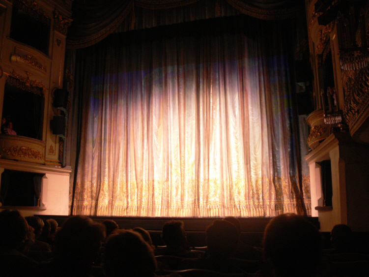 Landestheater Coburg Zuschauerraum